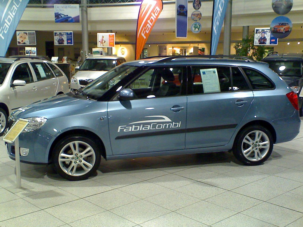 Škoda Fabia Combi (Fabia station wagon)